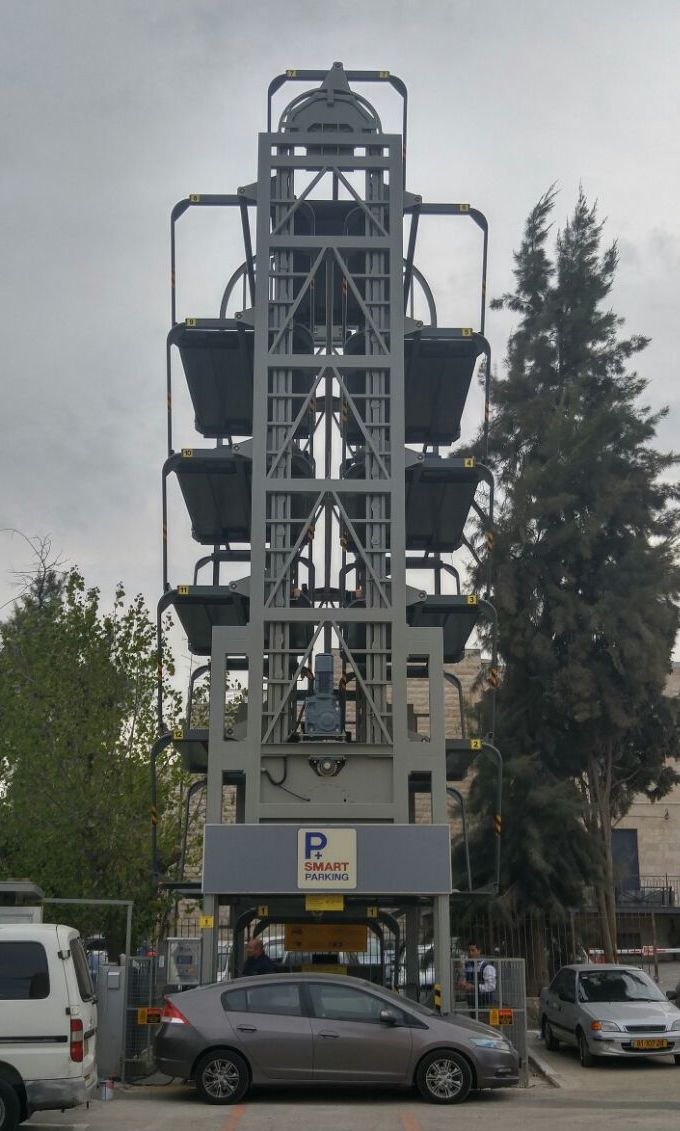 "Luna Park for Cars" in Jerusalem